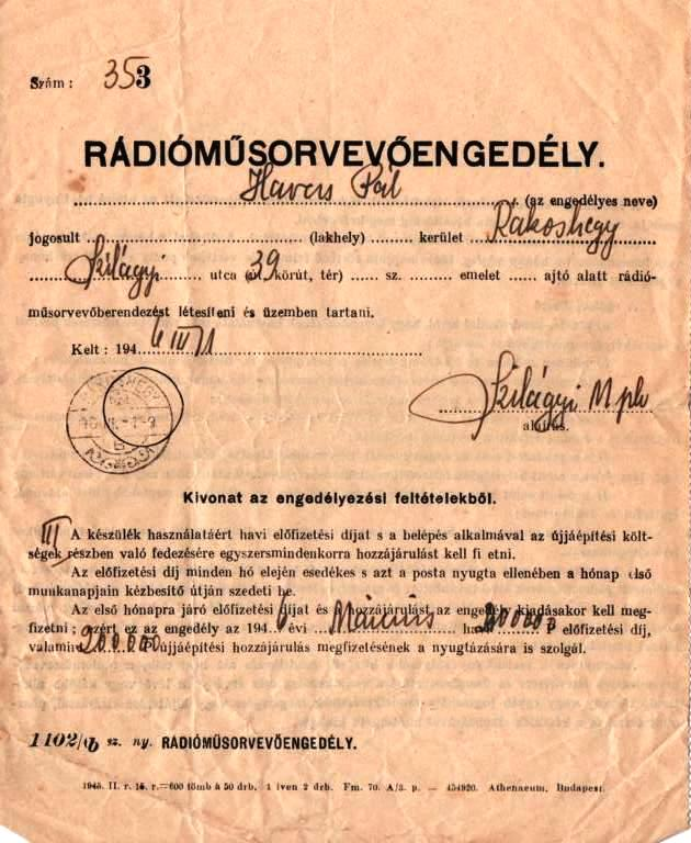 Rádióműsorvevő engedély